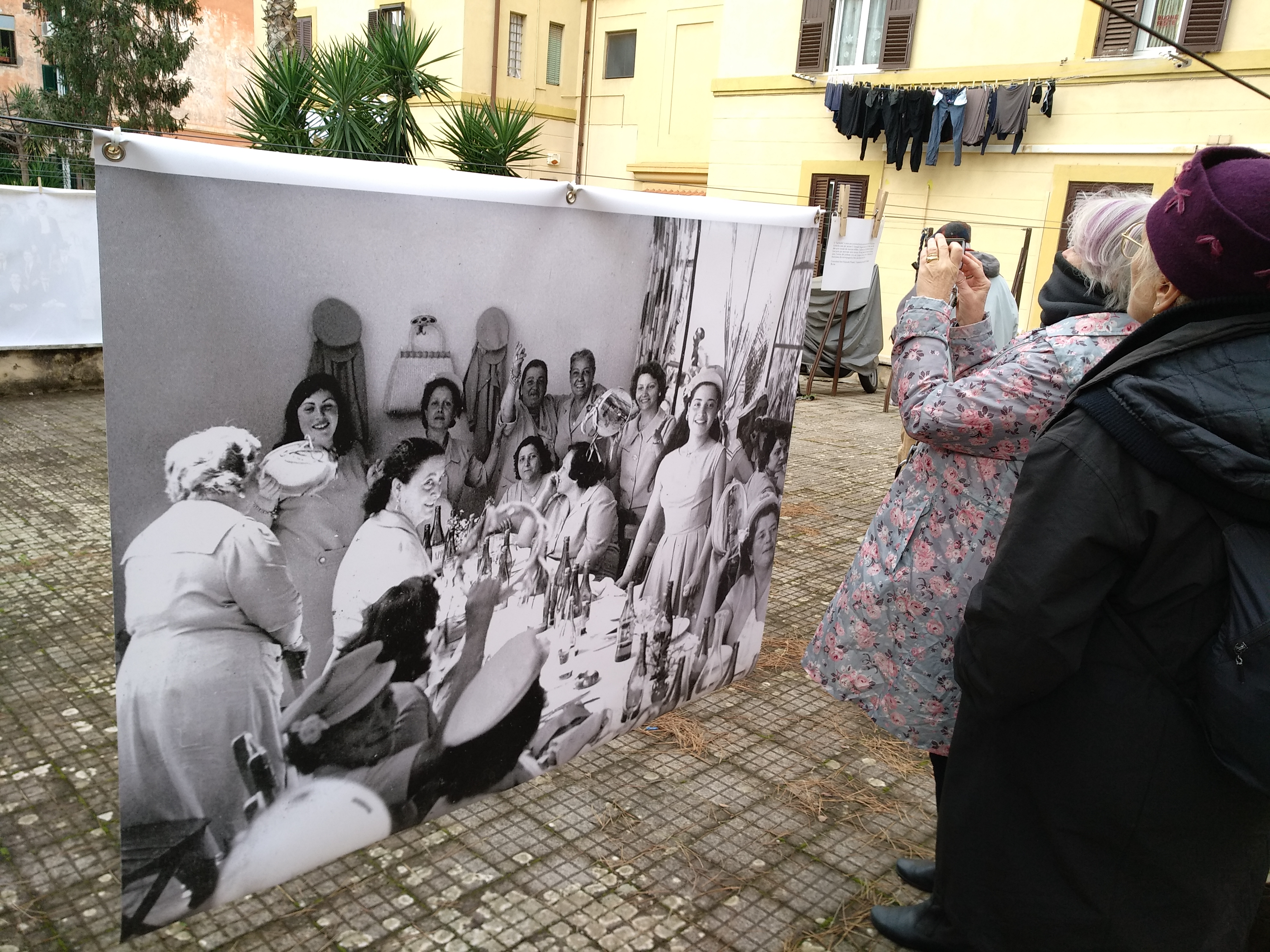 Visure Acatastali in visita alla Garbatella nel dicembre 2018